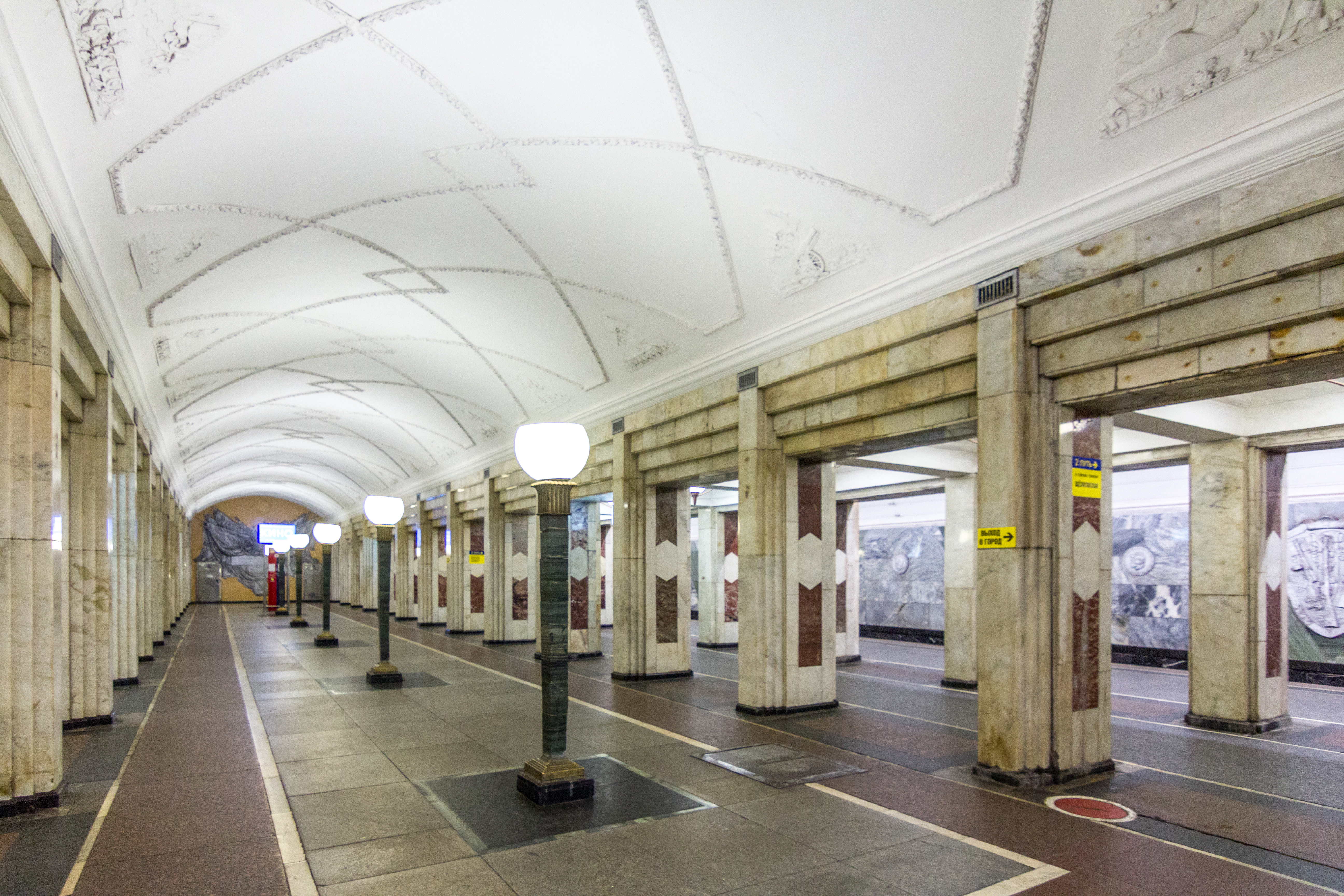 Семёновская (станция метро)